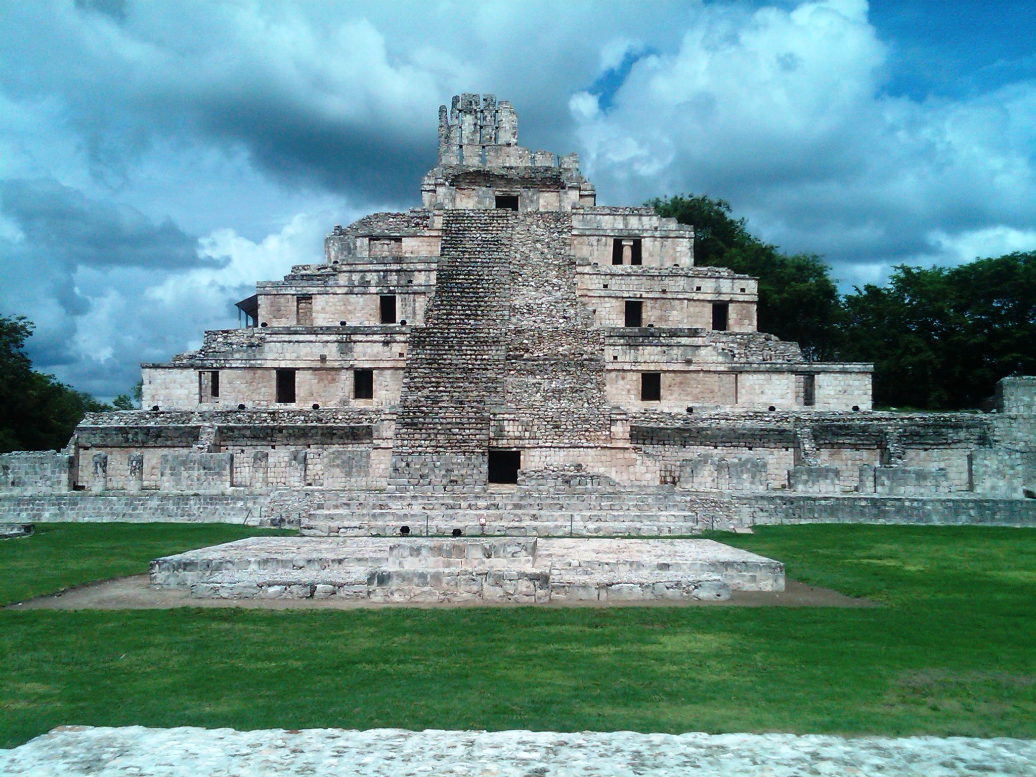 Zona Arqueologica de Edzna, Campeche